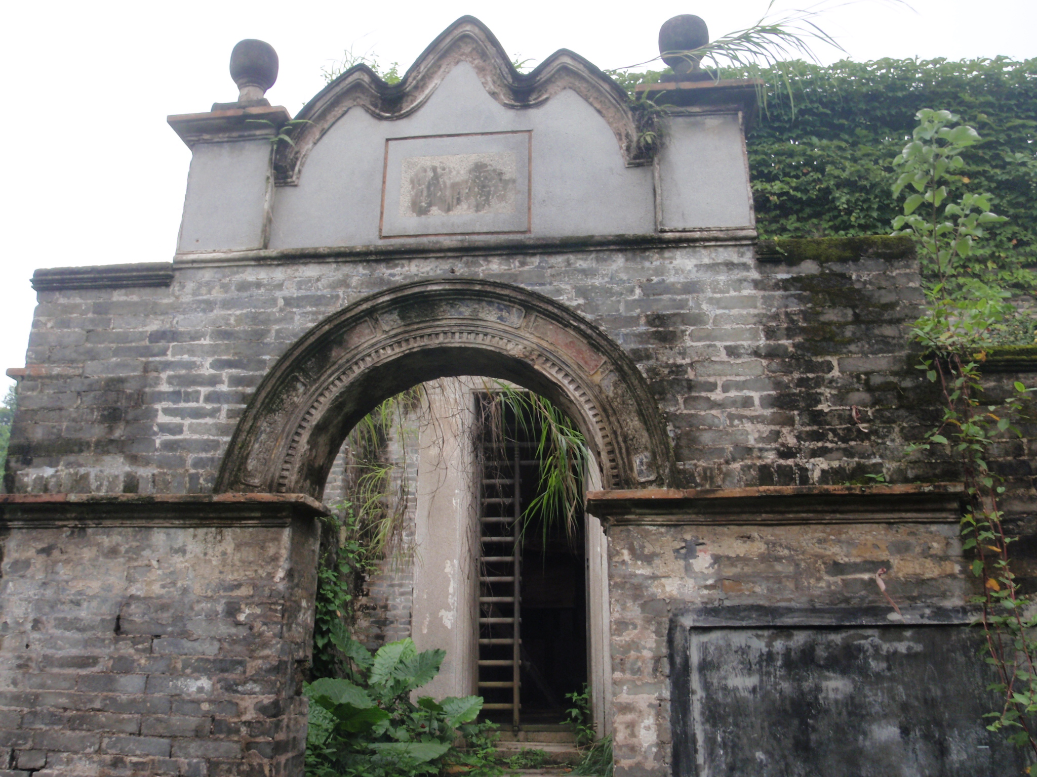 粵語: 廣州官洲島